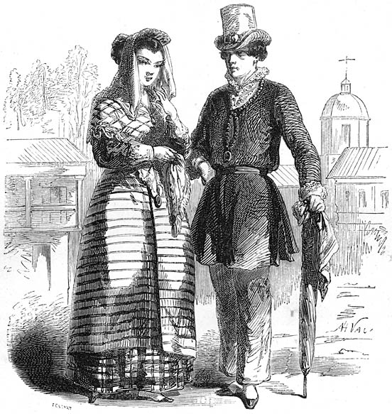 Tagalog Filipino mestizo couple, early 1800s. Original caption: Métis indiens-espagnols. From Aventures d'un Gentilhomme Breton aux iles Philippines by Paul de la Gironiere, published in 1855.